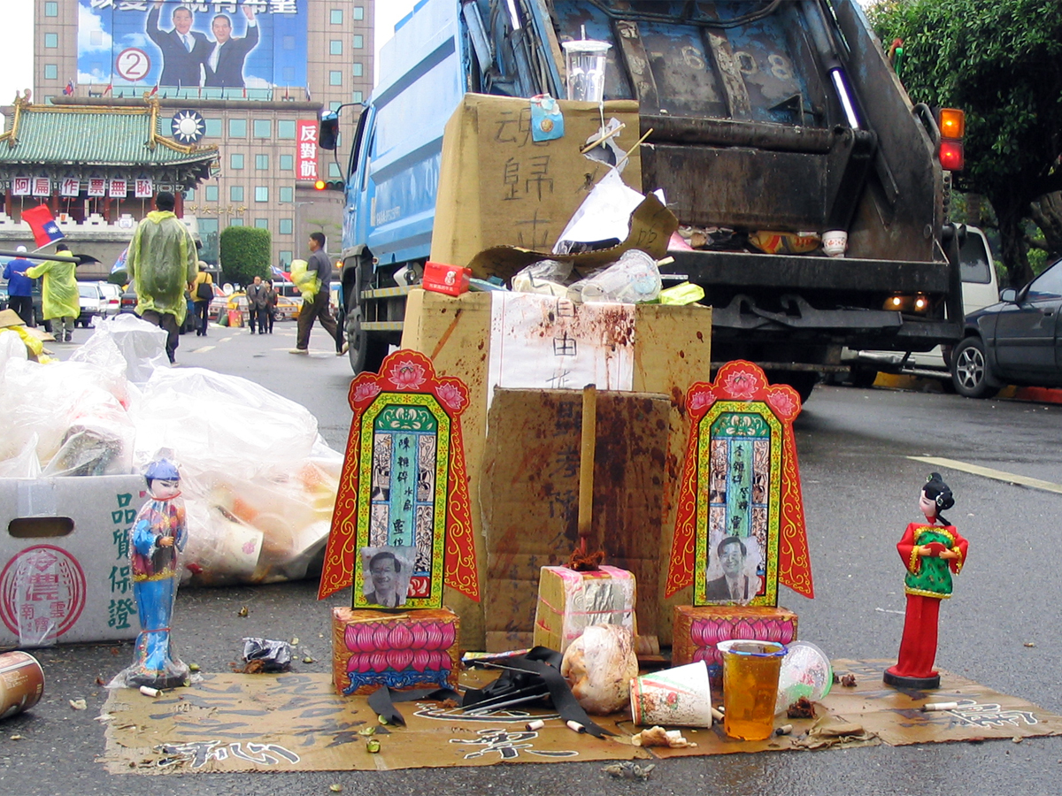 抗議民眾設立的陳水扁靈堂。採訪時順便拍攝，以Canon G1攝於2004年3月26日上午。 憤怒的泛藍支持者由於不滿319槍擊事件、政府後續處理以及選舉結果，所以製作了陳水扁及李登輝的牌位，藉以諷刺臺灣民主已死。 左上方建築物為中國國民黨中央委員會大樓，外面還有連戰及宋楚瑜的競選海報文宣。 Richy 16:56 2004年8月19日 (UTC)